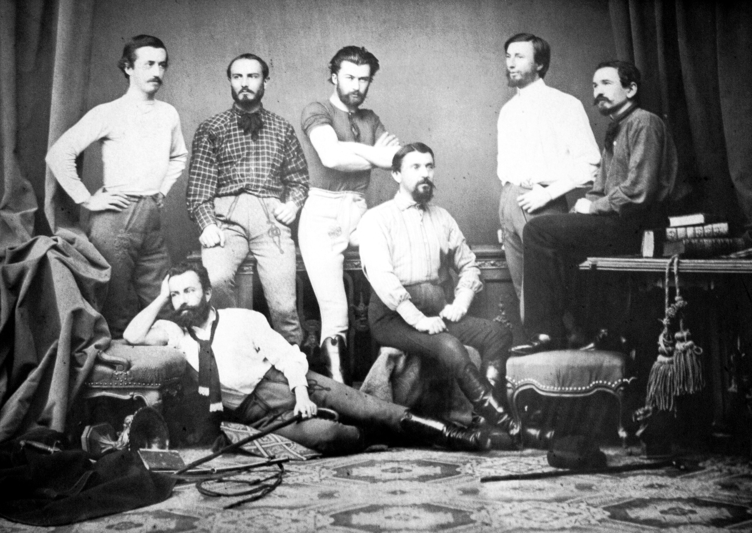 A Nemzeti Torna Egylet alapítói. A felvétel 1866-ban készült.